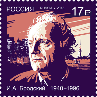 Почтовая марка "75 лет со дня рожденря И.А. Бродского", выпущенная в России 22 мая 2015 года. Тираж: 288 тыс. экз.